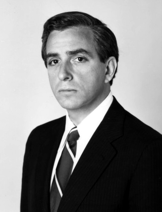 Richard Darman in 1983